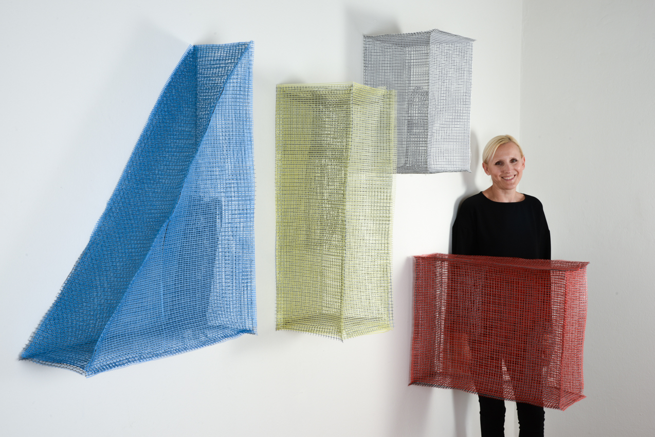 Margherita Turewicz Lafranchi